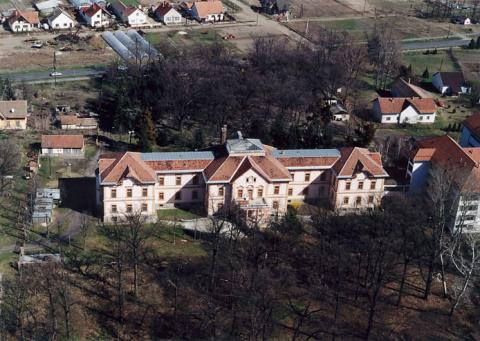 Ópusztaszer, Hungary, aerialphotography